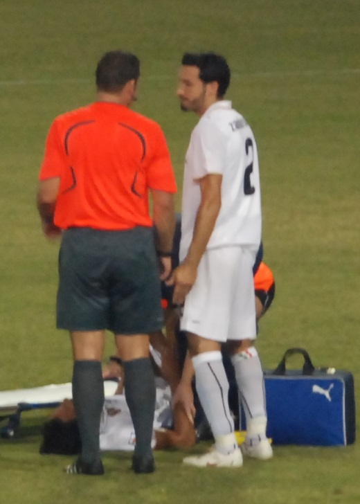 L'arbitro Pieter Vink discute con Gianluca Zambrotta durante Cipro-Italia